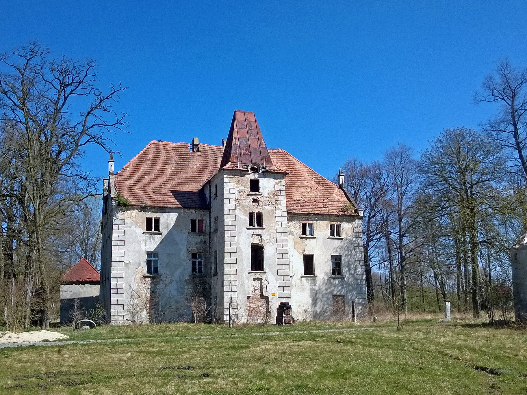 Schlossruine Sohra (Żarki Średnie)